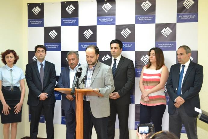 Civil contract (Armenia)